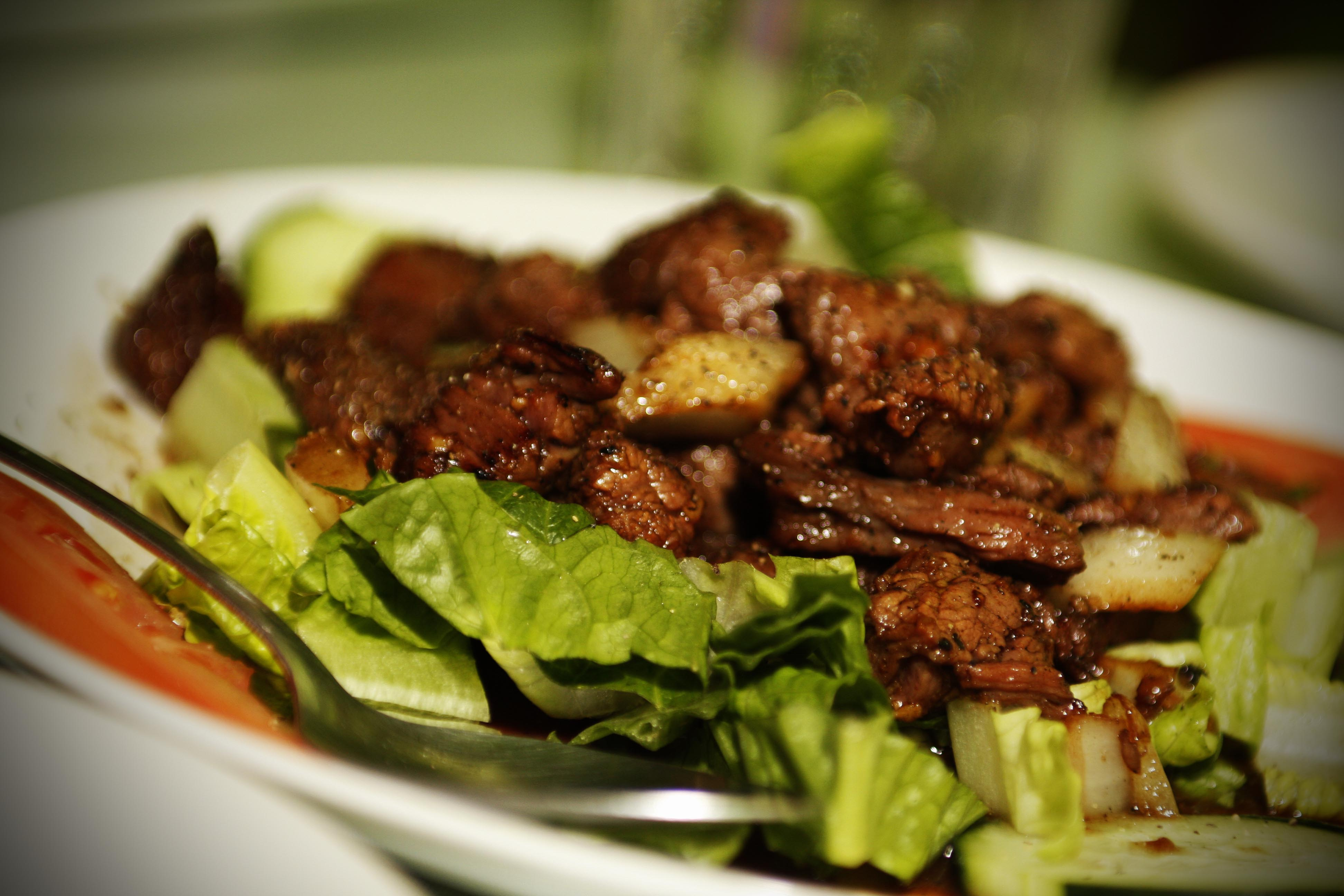 Bœuf Loc Lac